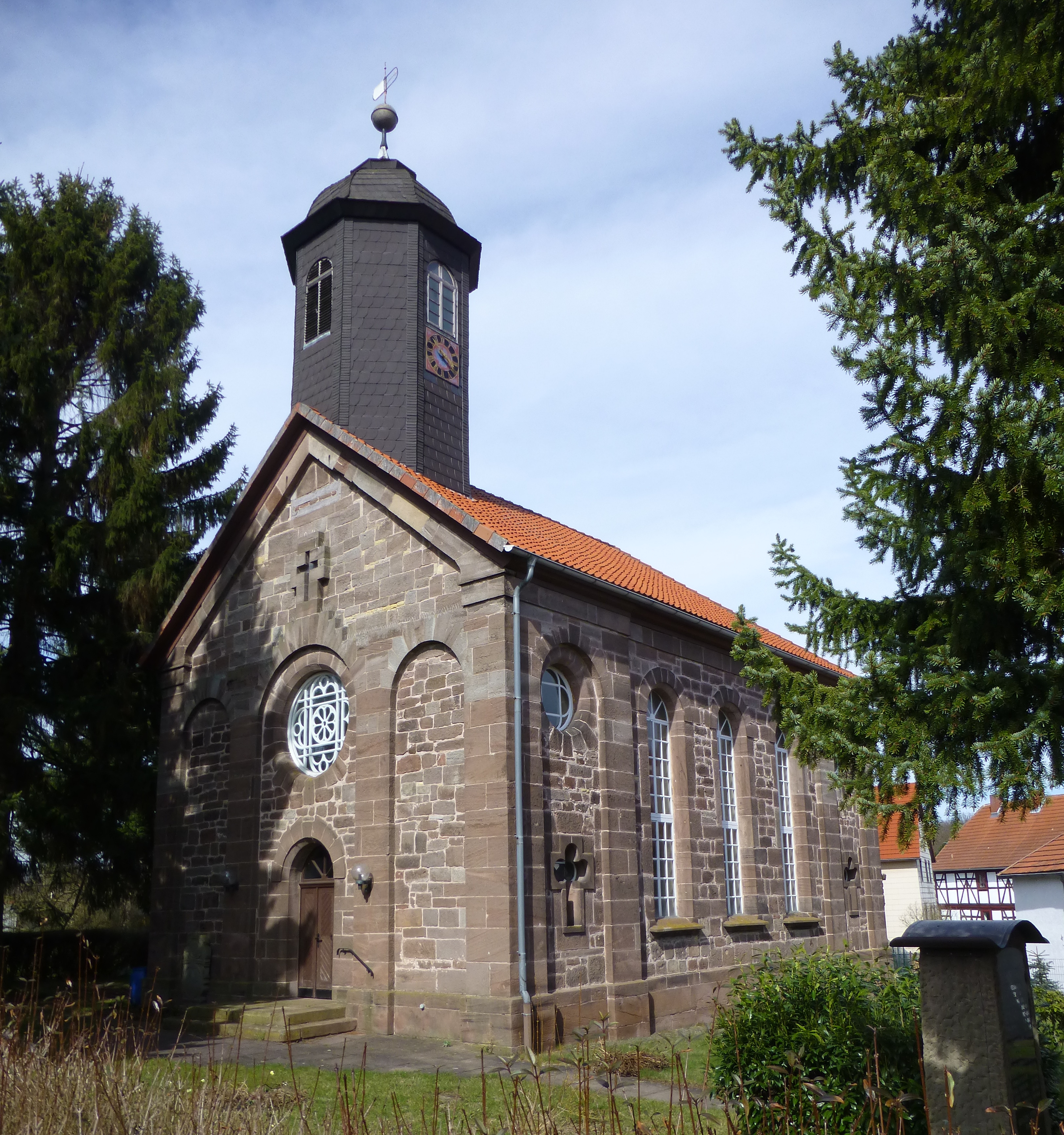 Evangelische Kirche in Marzhausen, Gemeinde Neu-Eichenberg, Nordhessen.